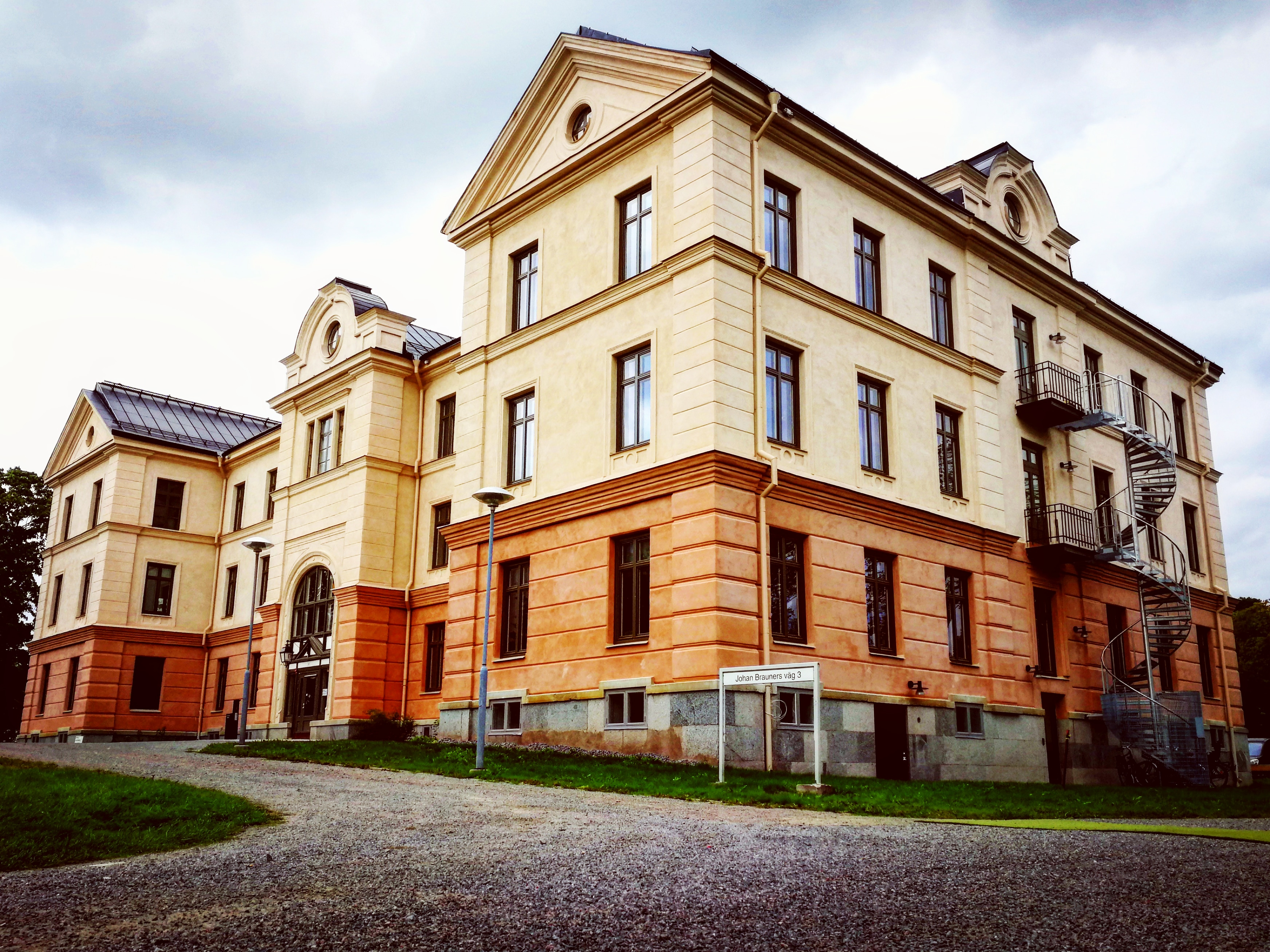 Uppsala Folkhögskola, Jan Brauners väg 3 i Ultuna Uppsala. Oktober 2018.